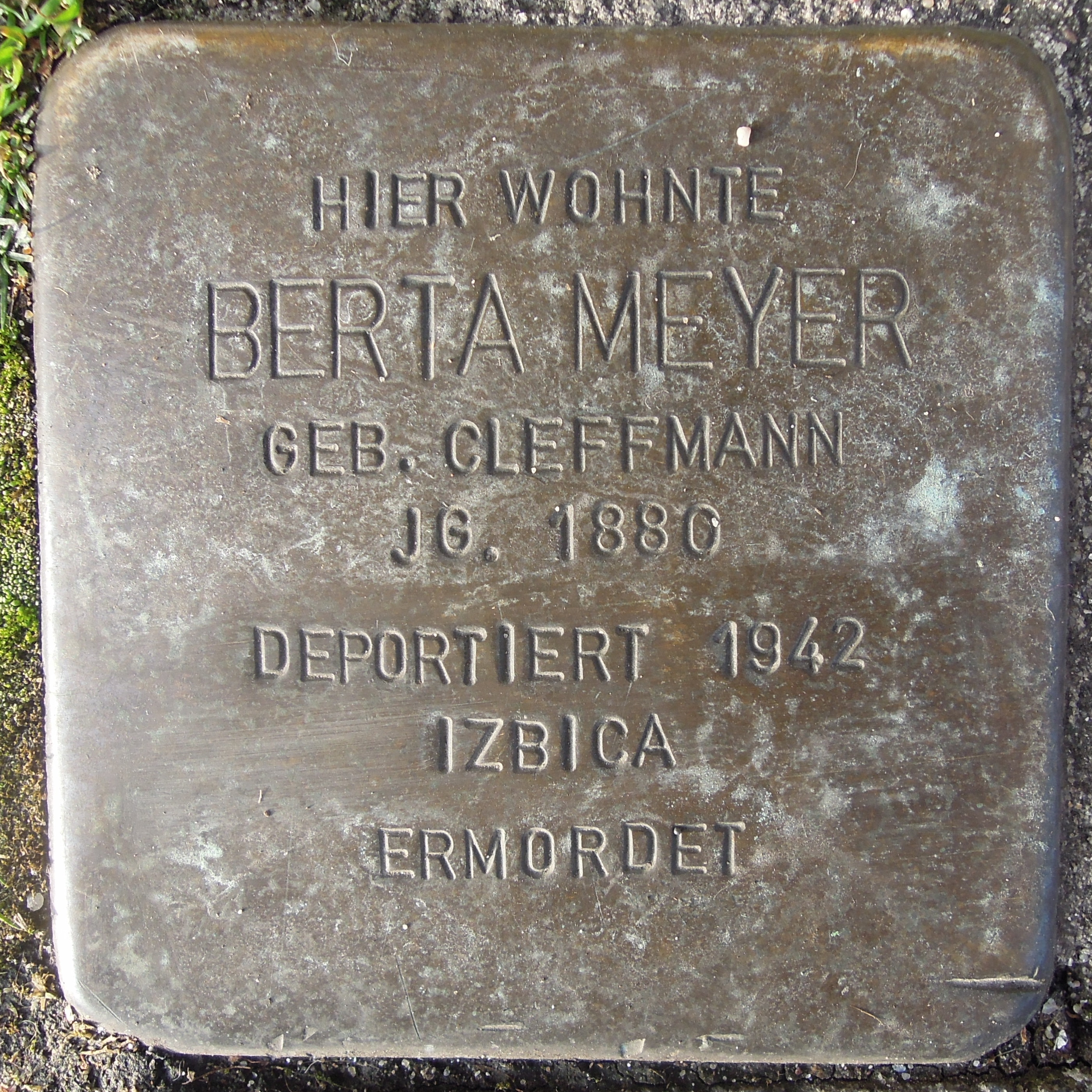 Stolperstein Alpen Lindenallee 8 Berta Meyer